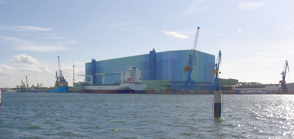 Beschreibung: Volkswerft, betrachtet von Dänholm aus Fotograf: Darkone, 18. Mai 2004